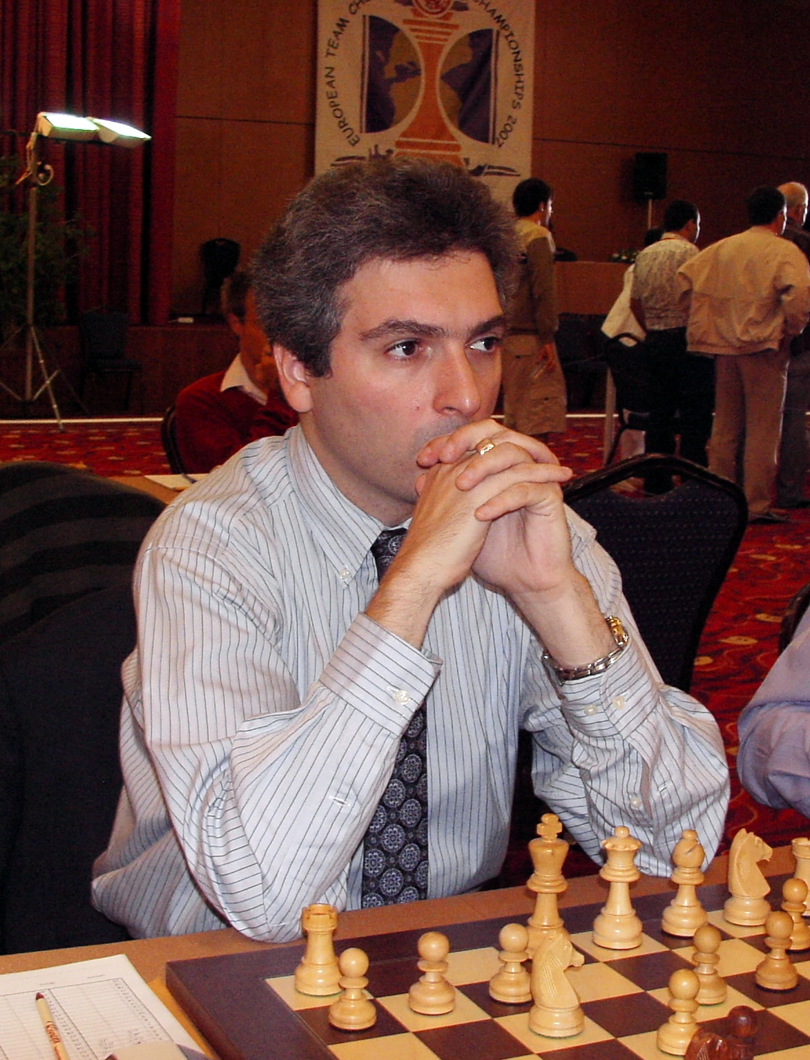 GM Vladimir Akopian Armenia, EuroChess Iraklion 2007